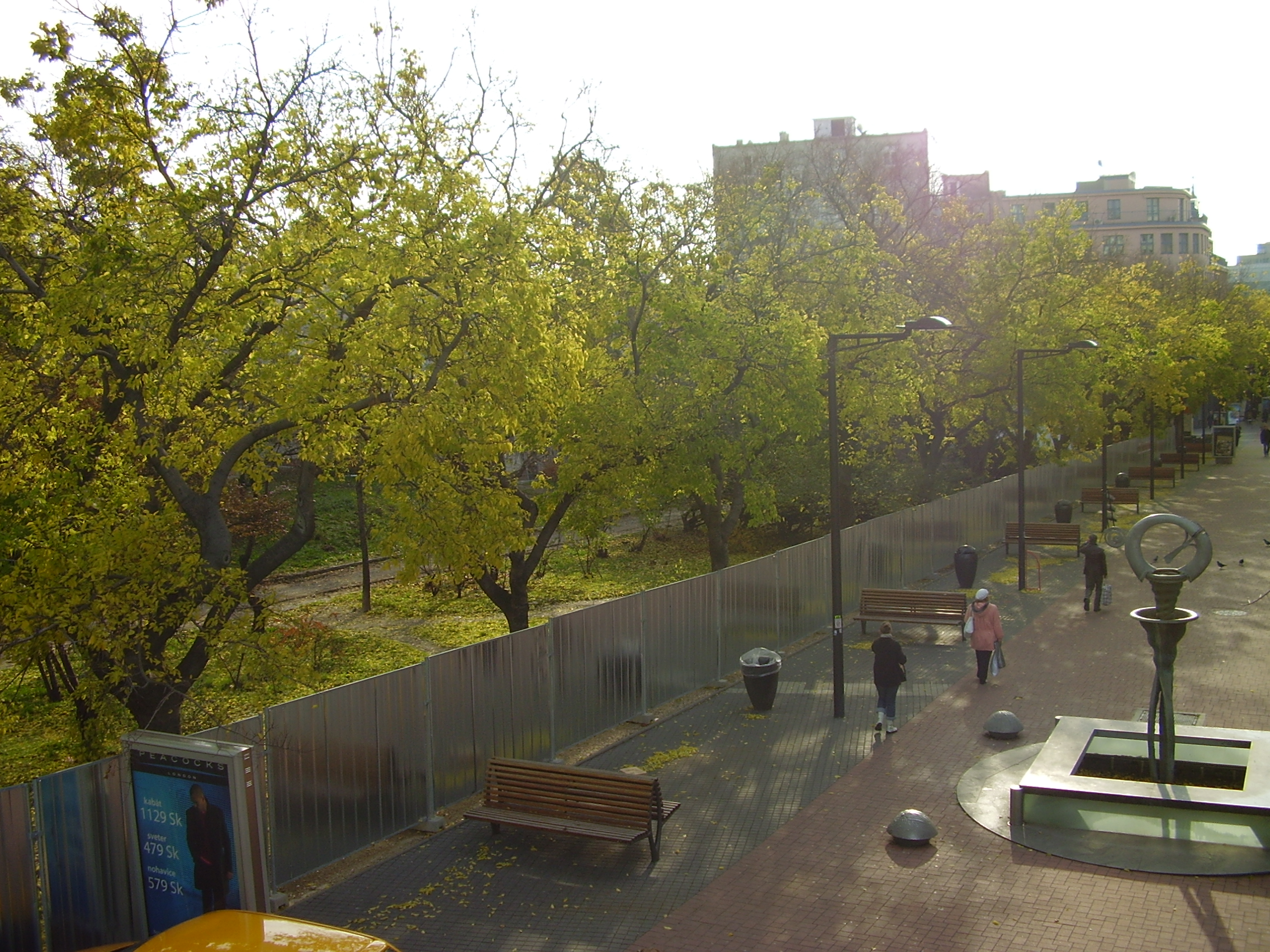 Poštová street, Old Town, Bratislava